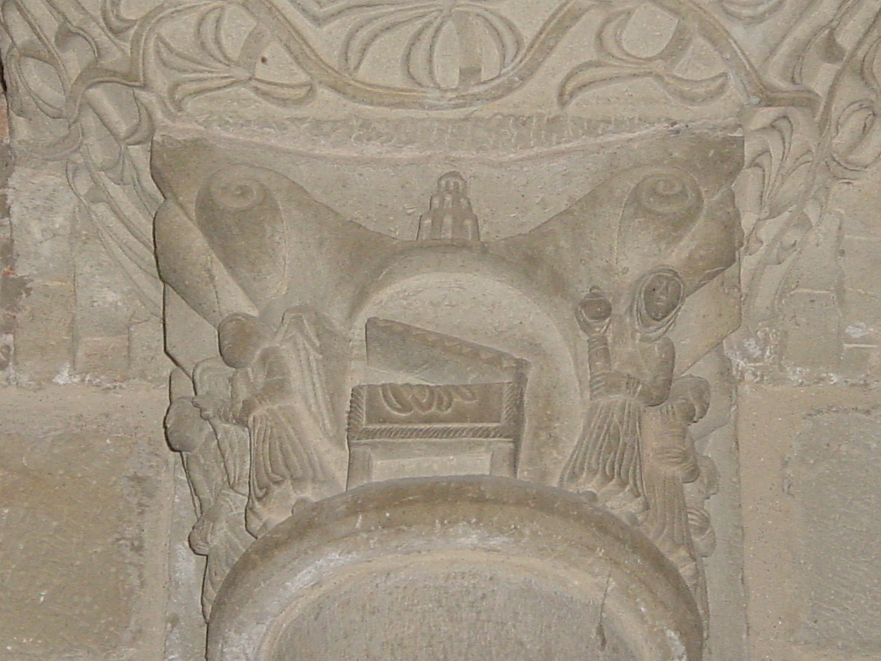 Torres del Río en la provincia de Navarra, España. Se encuentra situada en el Camino de Santiago. Capitel de la iglesia románica del Santo Sepulcro con la escena del sepulcro vacío.